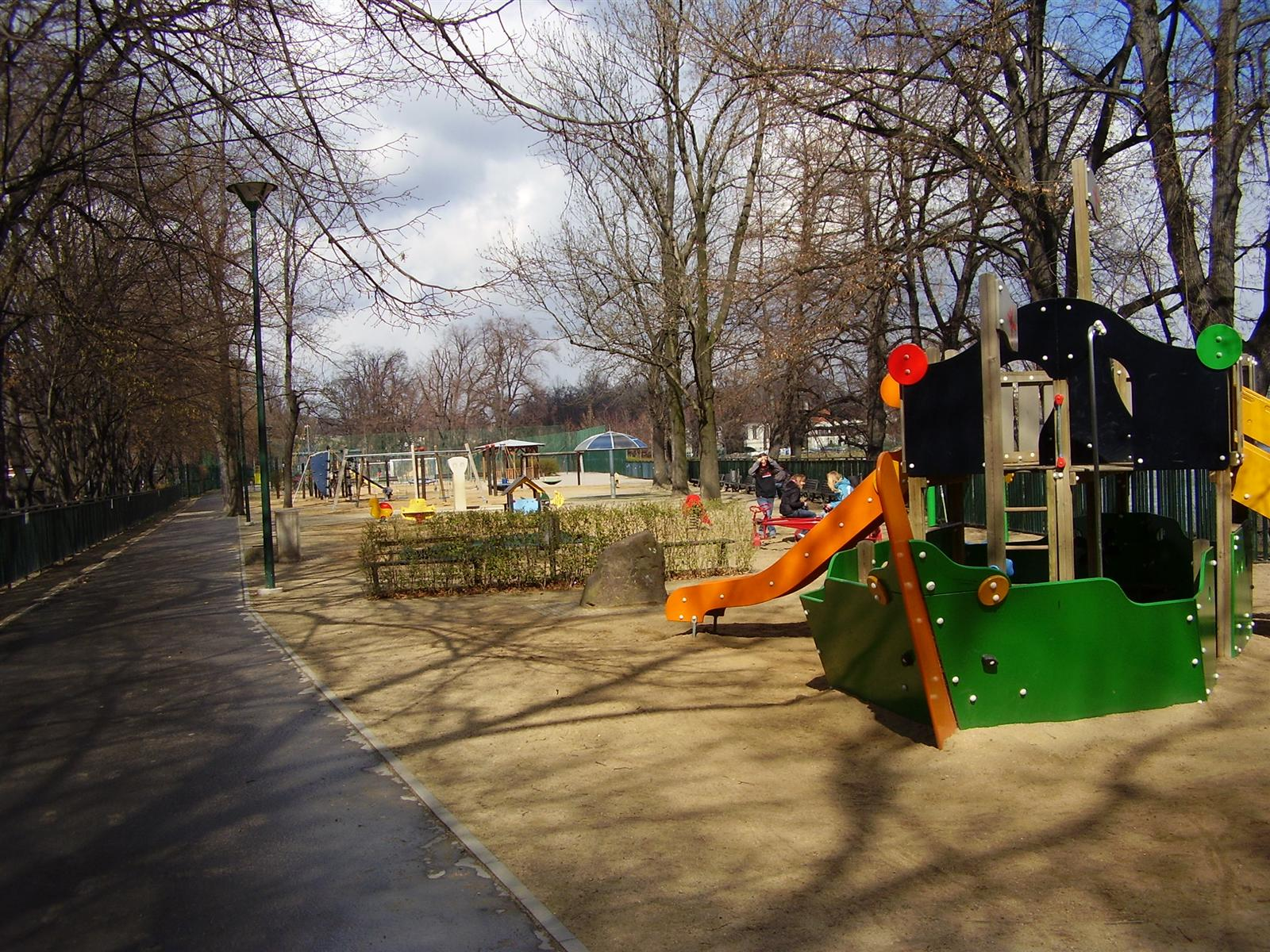 Dětský ostrov v Praze s prolézačkami pro děti